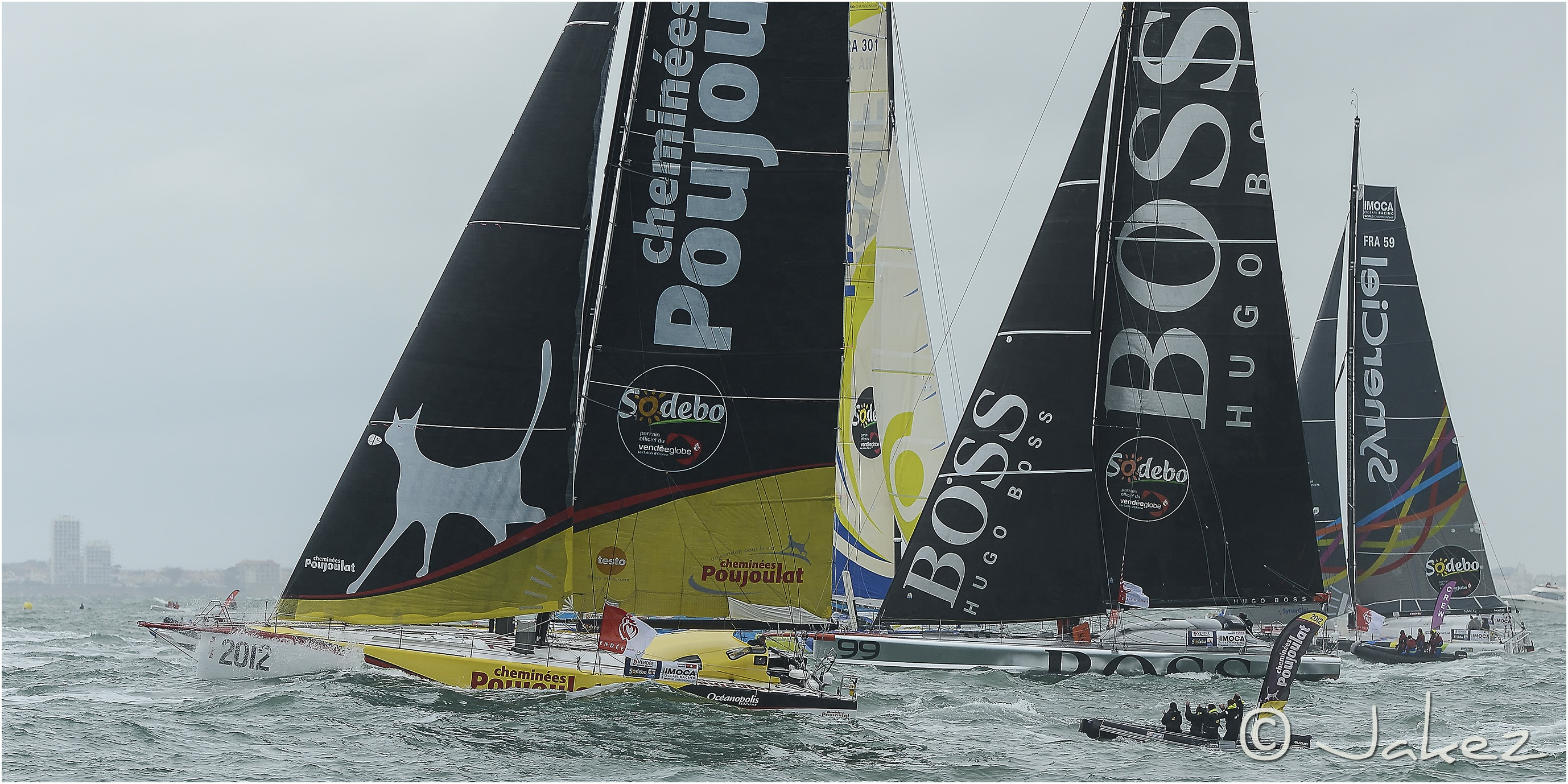 0554-Vendée 2012 (Départ)